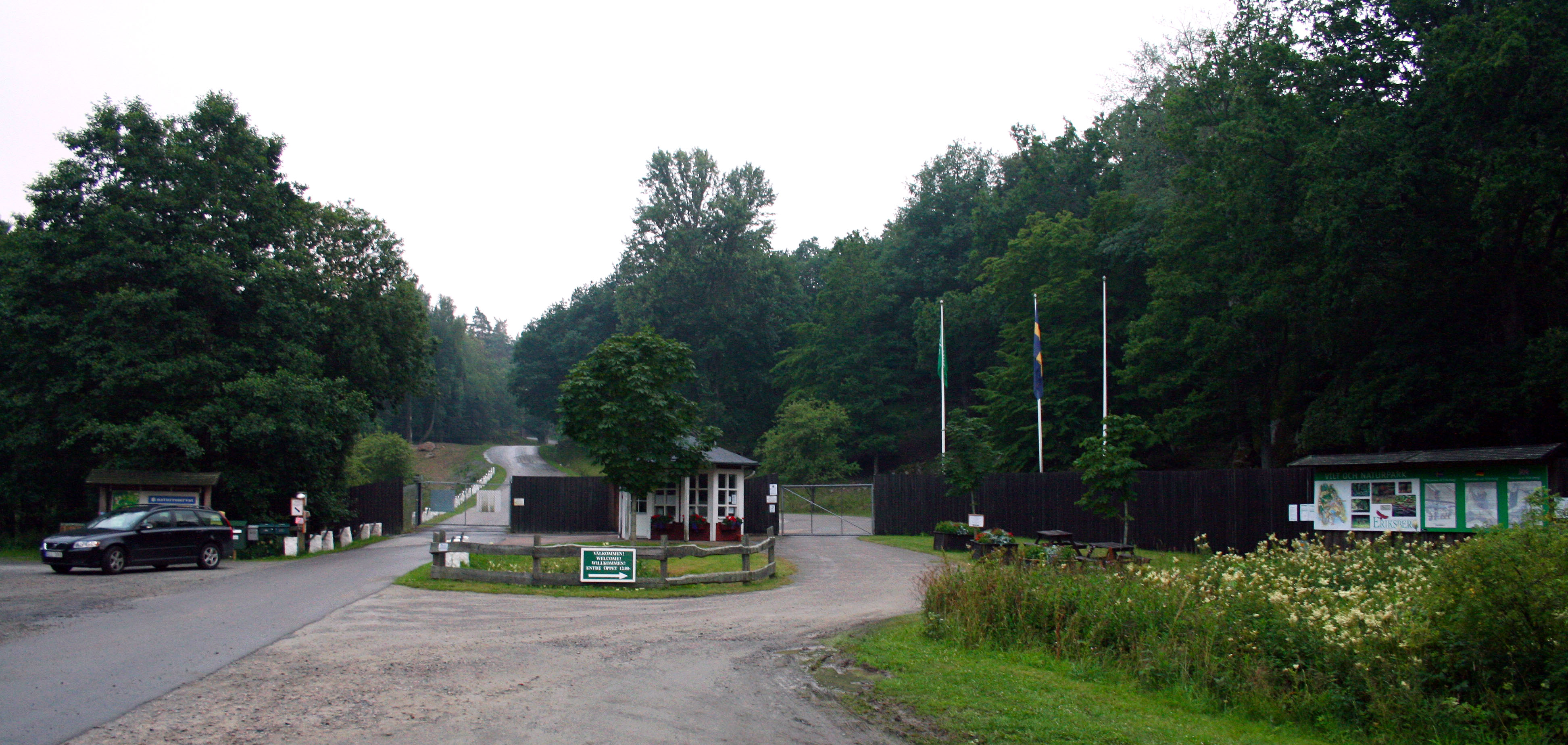 Entrén till Eriksberg Vilt- och Naturpark, Blekinge